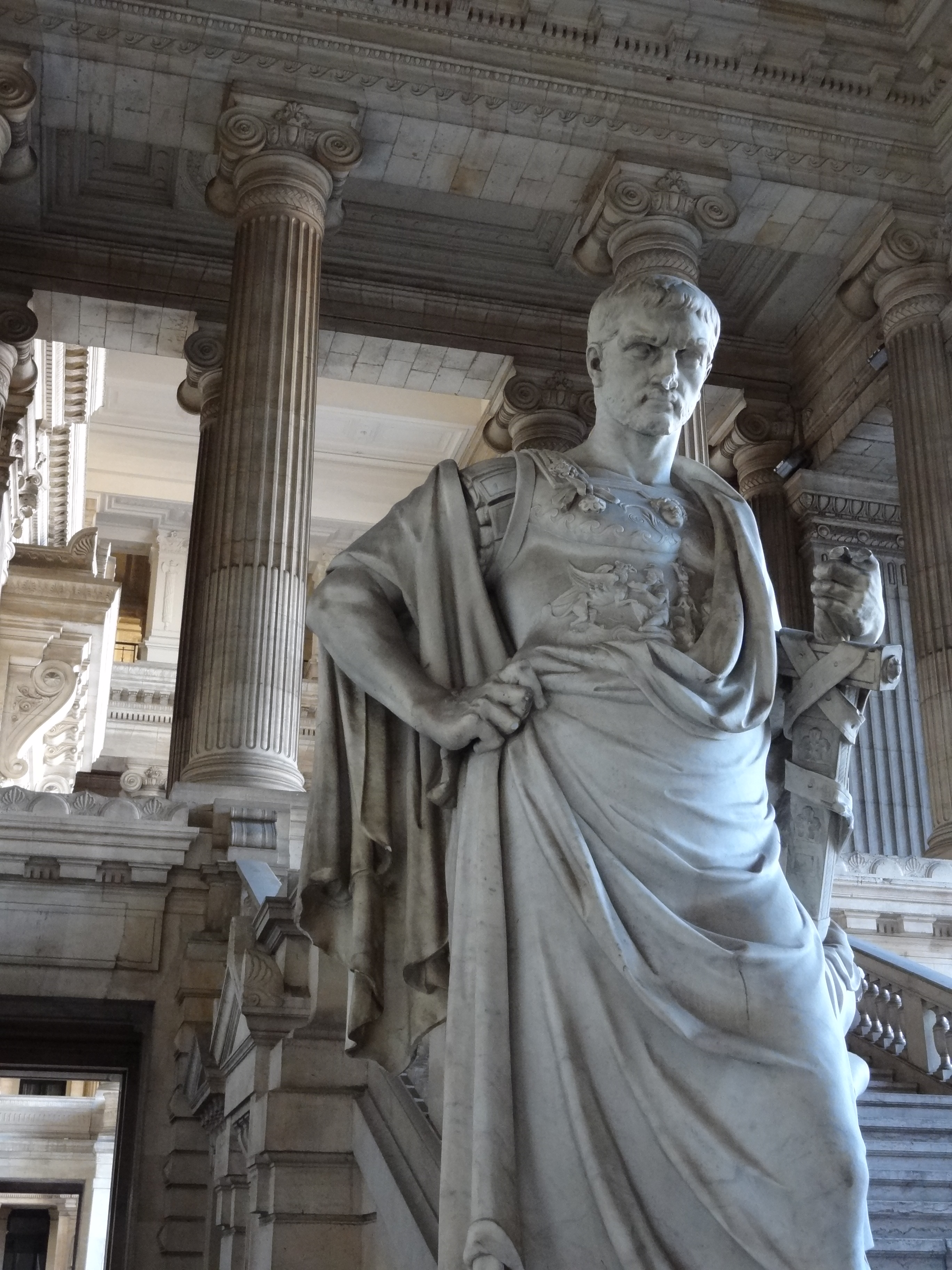 Statue dedans le Palais de justice.